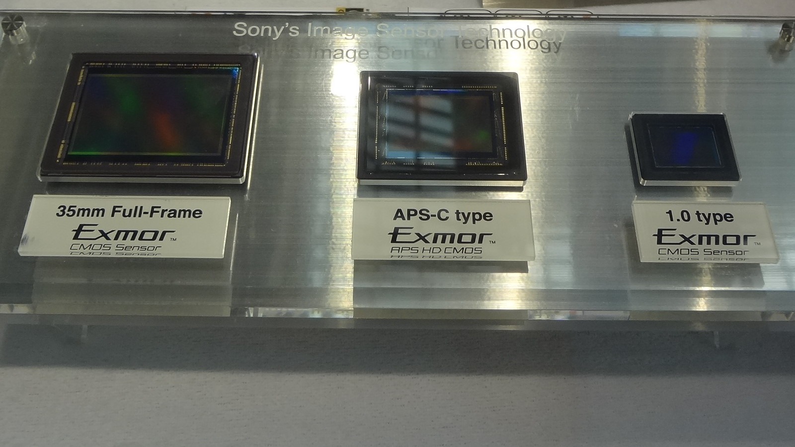 2013年資訊月，Sony攤位展示的Exmor感光元件。